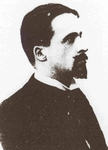 Franciszek Mirandola (właśc. Franciszek Czcisław Pik, 1871 - 1930), polski pisarz, poeta i tłumacz okresu Młodej Polski.